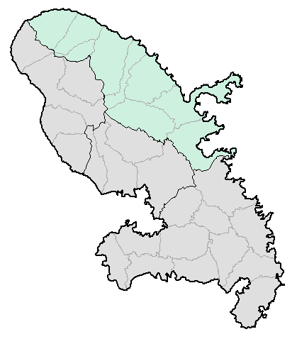 Carte de la Martinique avec l'arrondissement de La Trinité en couleur. Map of French department of Martinique with La Trinité "arrondissement" in color.